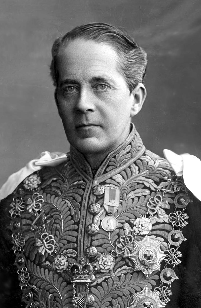 George Cadogan, 5th Earl Cadogan (1840-1915)